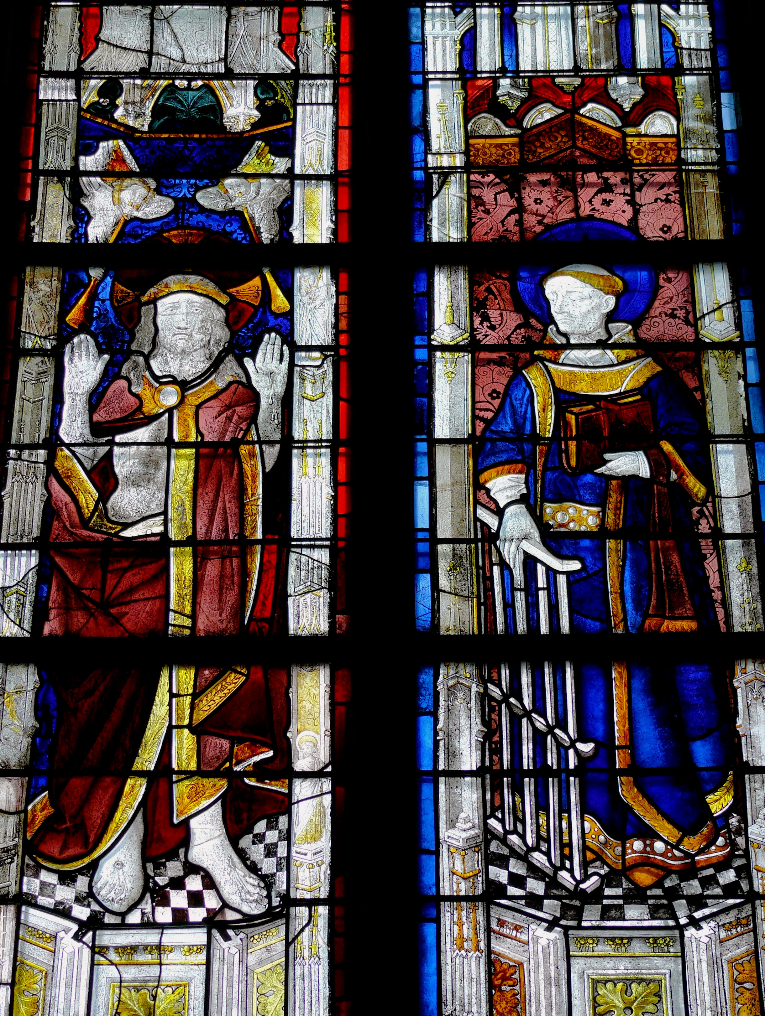 La Ferté-Bernard - Eglise Notre-Dame-des-Marais - Baie n°5 - Le Christ montrant ses cinq plaies et saint Laurent